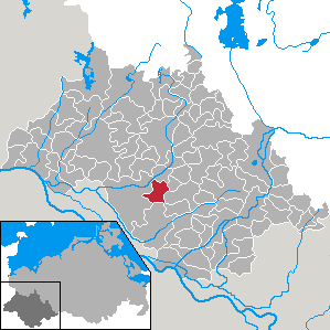 Belsch in Mecklenburg-Vorpommern - district Ludwigslust